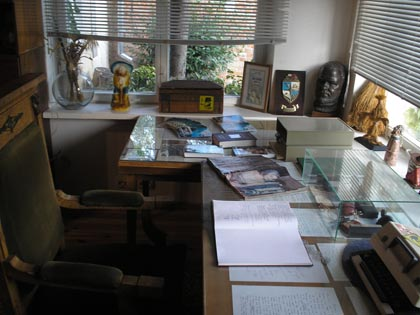 Музей в Оливе - рабочий кабинет писателя